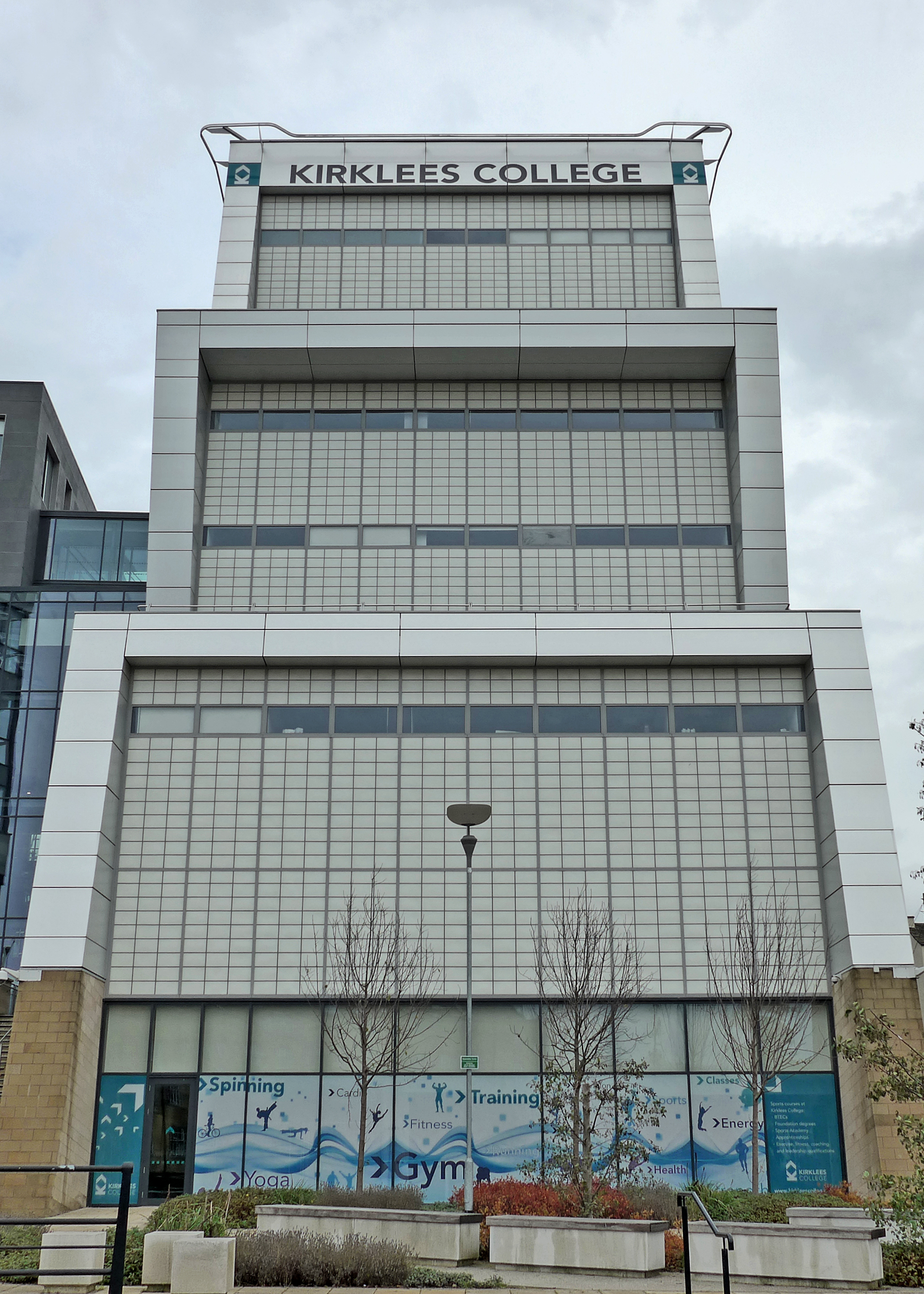 Kirklees College